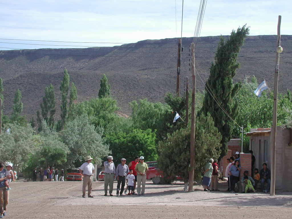 Telsen